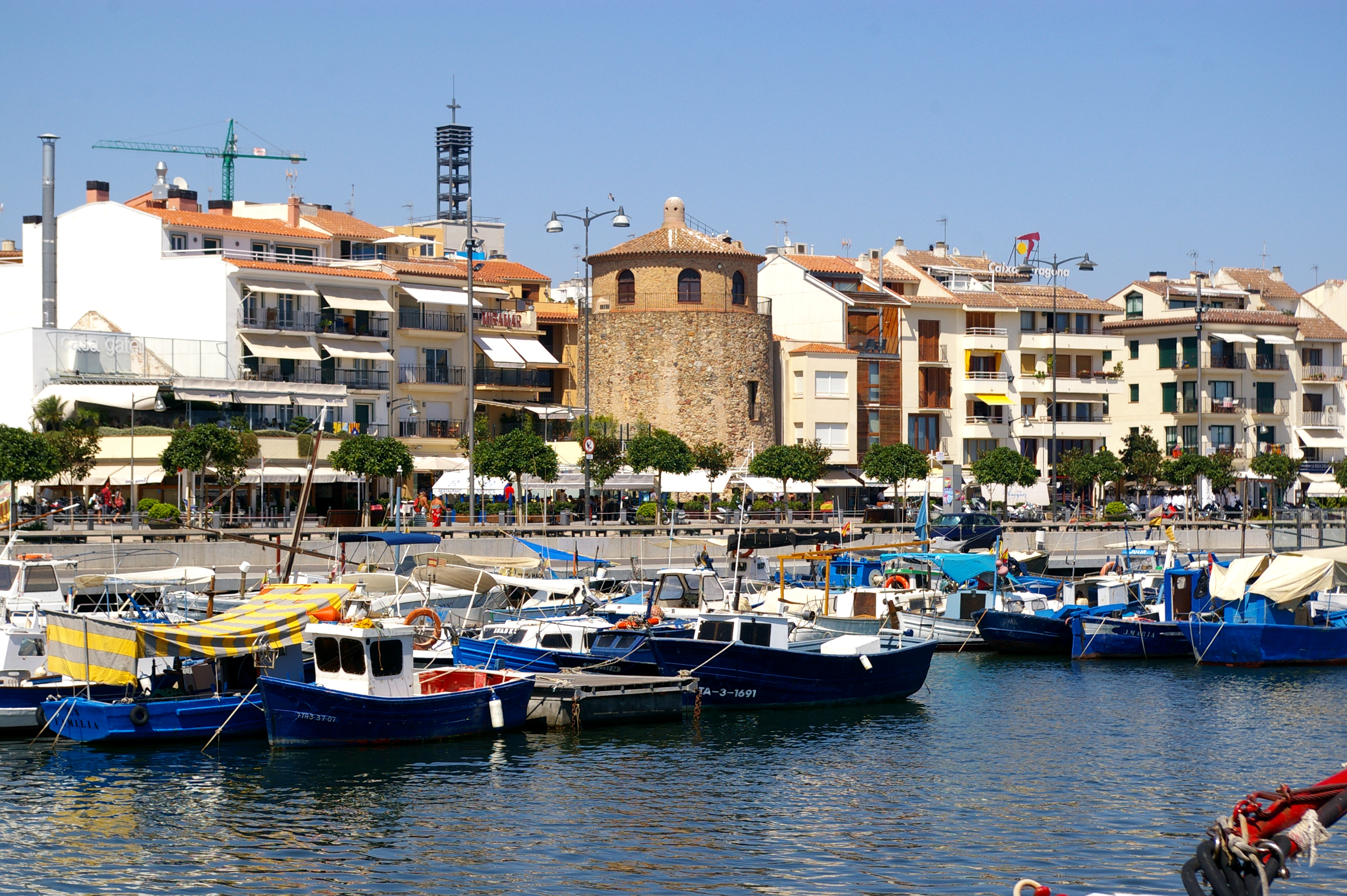 Cambrils (Baix Camp, Catalunya)